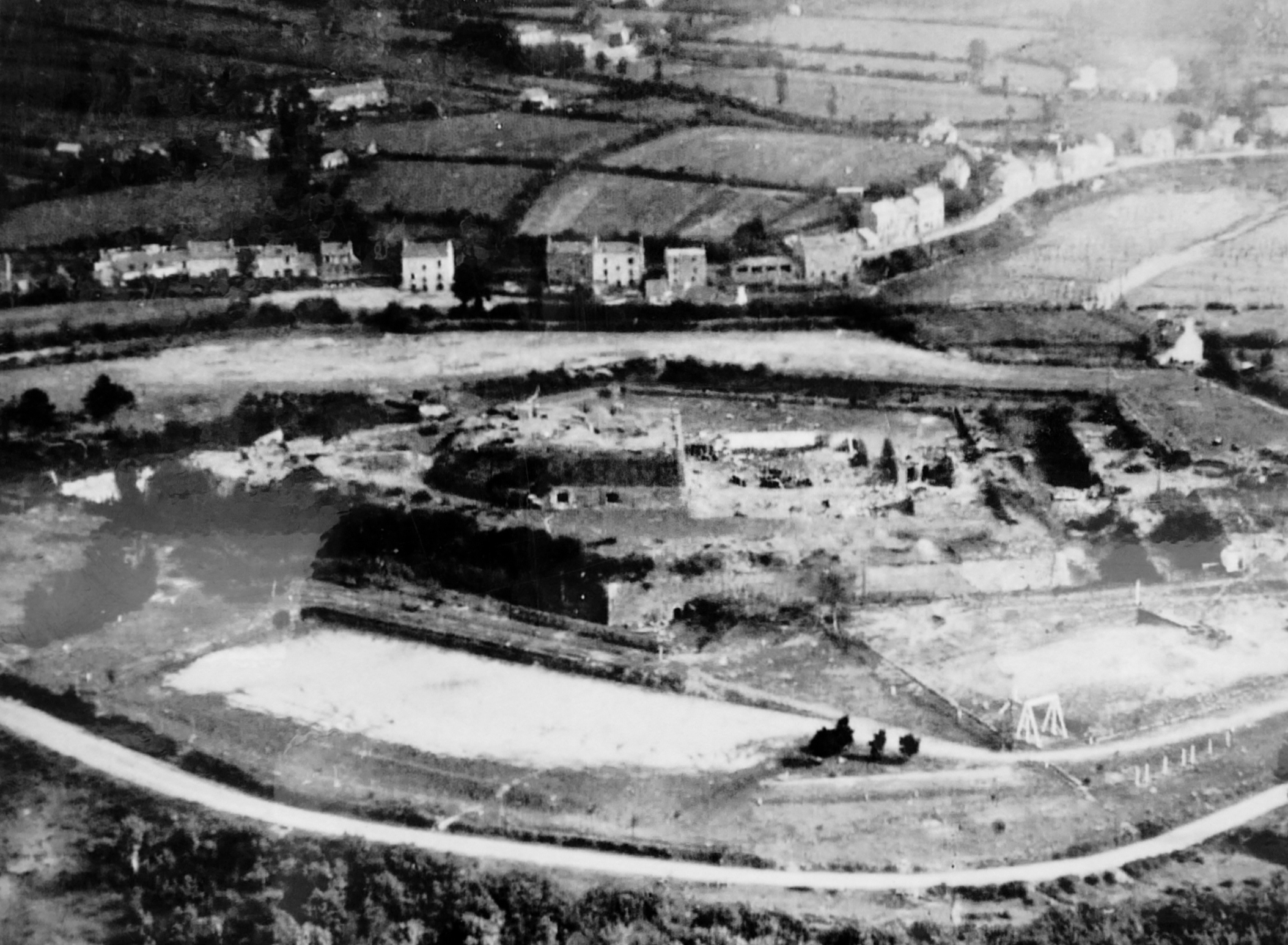 Fort de Penfeld settembre 1944